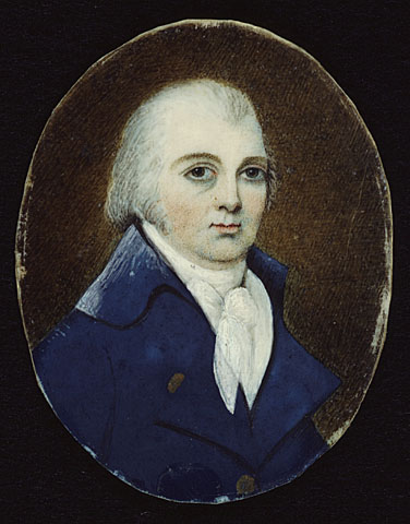 Title / Titre :Sir John Johnson Creator(s) / Créateur(s) : Unknown / Inconnu Date(s) : ca. 1770 Reference No. / Numéro de référence : MIKAN 2837547 / C-088436 Credit / Mention de source : Library and Archives Canada, C-088436 / Bibliothèque et Archives Canada, C-088436 Description / Descriptions : The eldest son of Sir William Johnson, John Johnson (1741-1830) was a prominent loyalist during the American Revolution. He was an army officer, an Indian Department official, politician, landowner and seigneur. Although he inherited his father's lands and responsibilities in the Mohawk Valley in 1774, he fled to Montreal during the American Revolution and remained there until his death. This miniature was acquired from a member of the Johnson family. / Fils aîné de sir William Johnson, John Johnson (1741-1830) fut un éminent loyaliste durant la guerre de l’Indépendance américaine. Il fut officier de l'armée, fonctionnaire aux Affaires indiennes, politicien, propriétaire foncier et seigneur. Même s'il hérita des terres et des responsabilités de son père dans la vallée de la Mohawk en 1774, il s'enfuit à Montréal durant la la guerre de l’Indépendance et y demeura jusqu'à sa mort